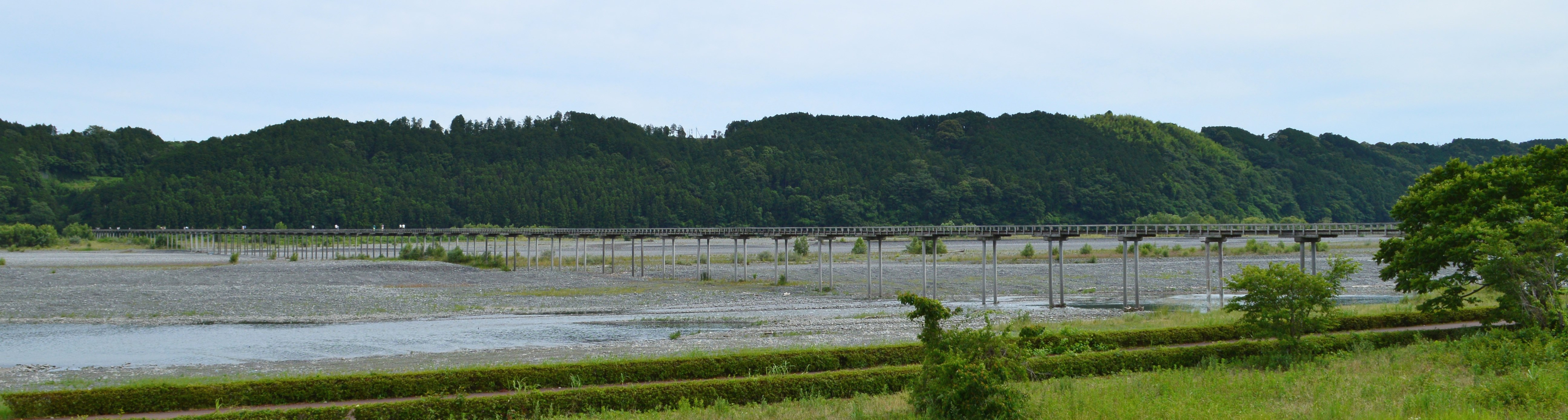 蓬莱橋 (島田市) 全景